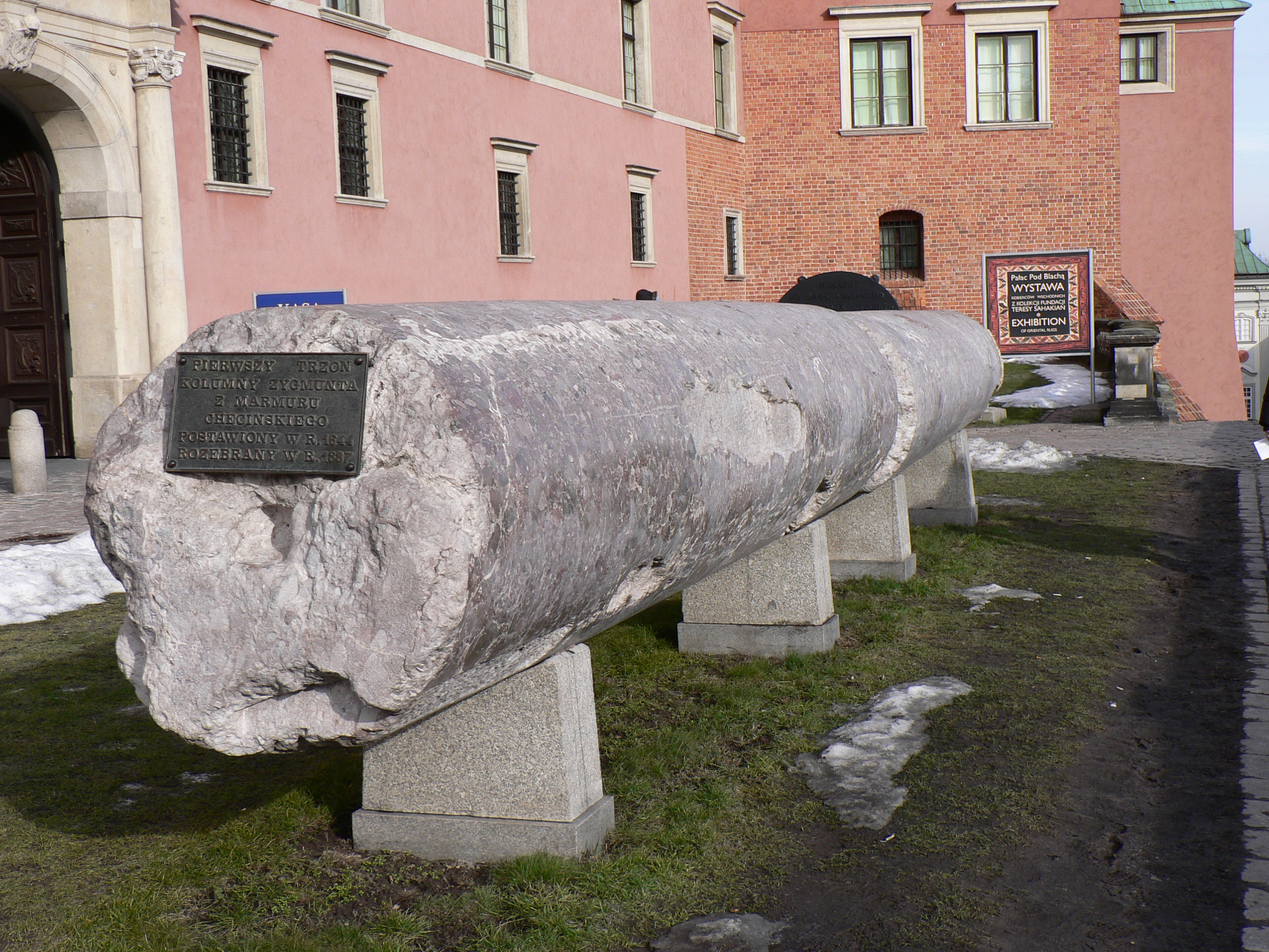 Stare trzony kolumny Zygmunta w Warszawie